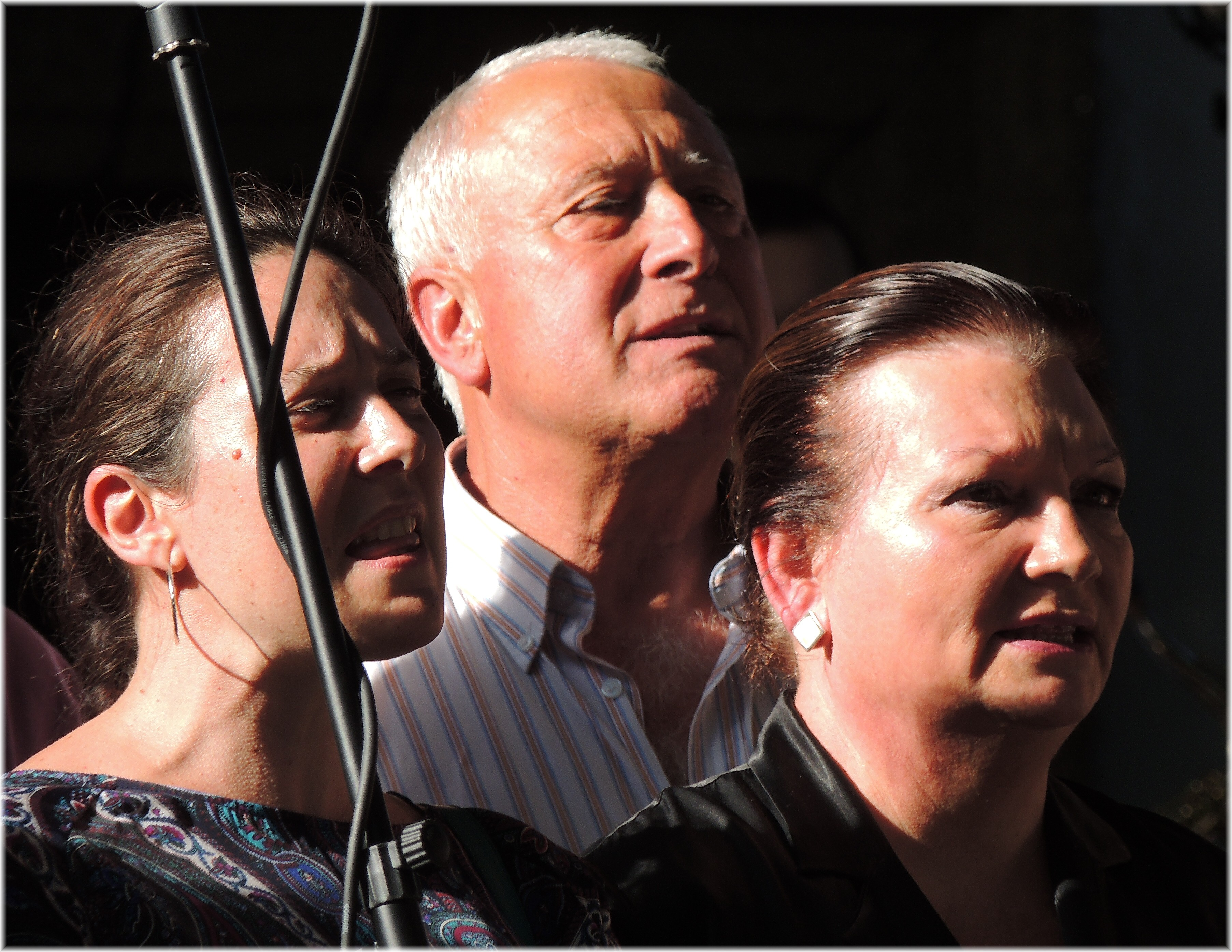 Cántigas da Terra